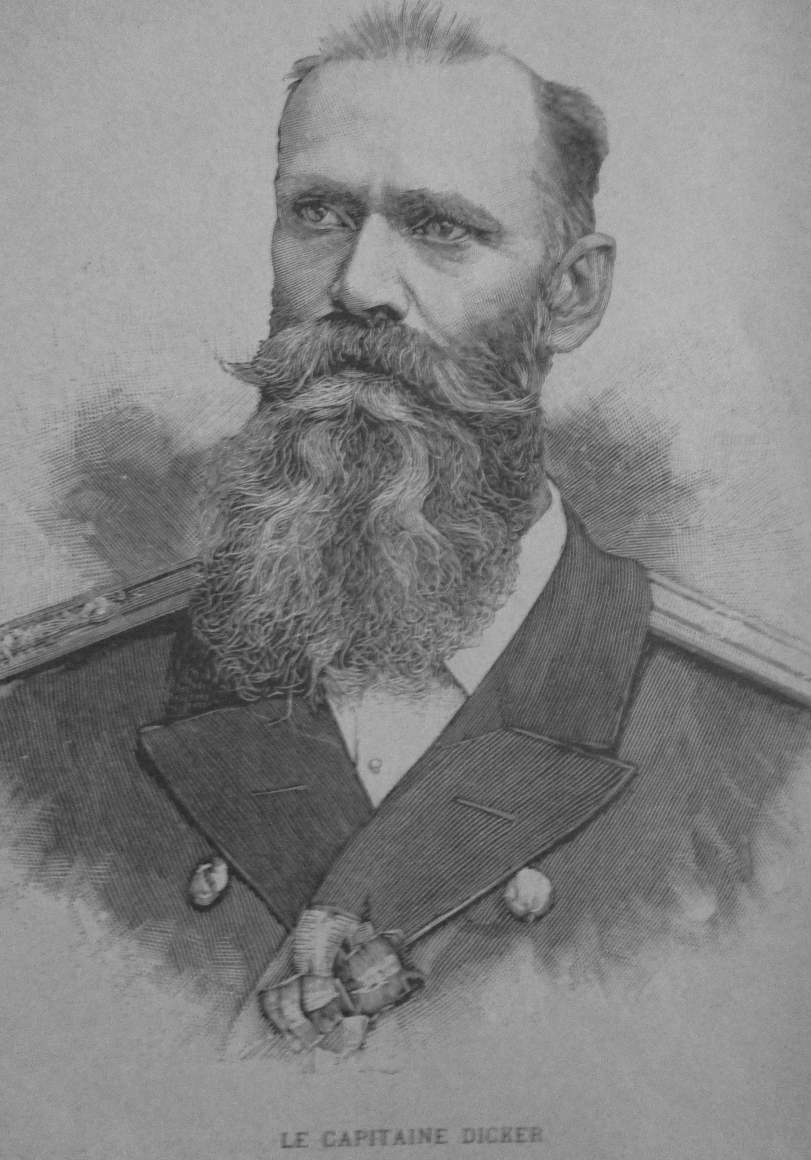 Le capitaine Richard Dicker (1847-1939), commandant de l'Empereur Nicolas Ier pendant la visite de l'escadre russe à la marine française à Toulon en octobre 1893 dans le cadre de l'Alliance franco-russe, in L'Illustration, 14 octobre 1893.